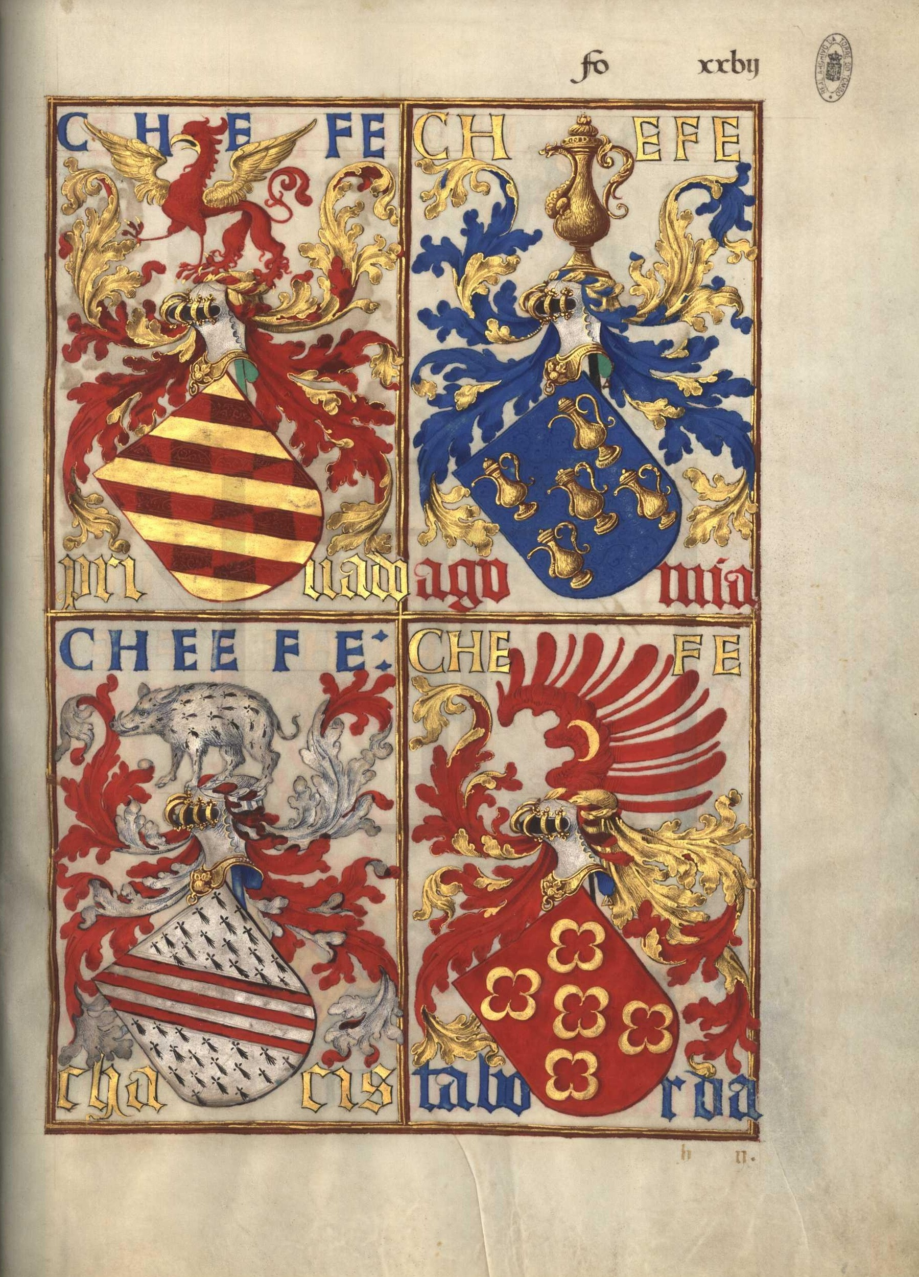 Livro da Nobreza e Perfeiçam das Armas (fl 27)